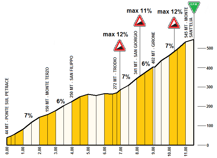 Palmi - Profilo altimetrico della salita di Sant'Elia a Palmi, strada statale 18 Tirrena Inferiore, percorsa per undici edizioni del Giro d'Italia e nella quasi totalità delle edizioni del Giro della Provincia di Reggio Calabria